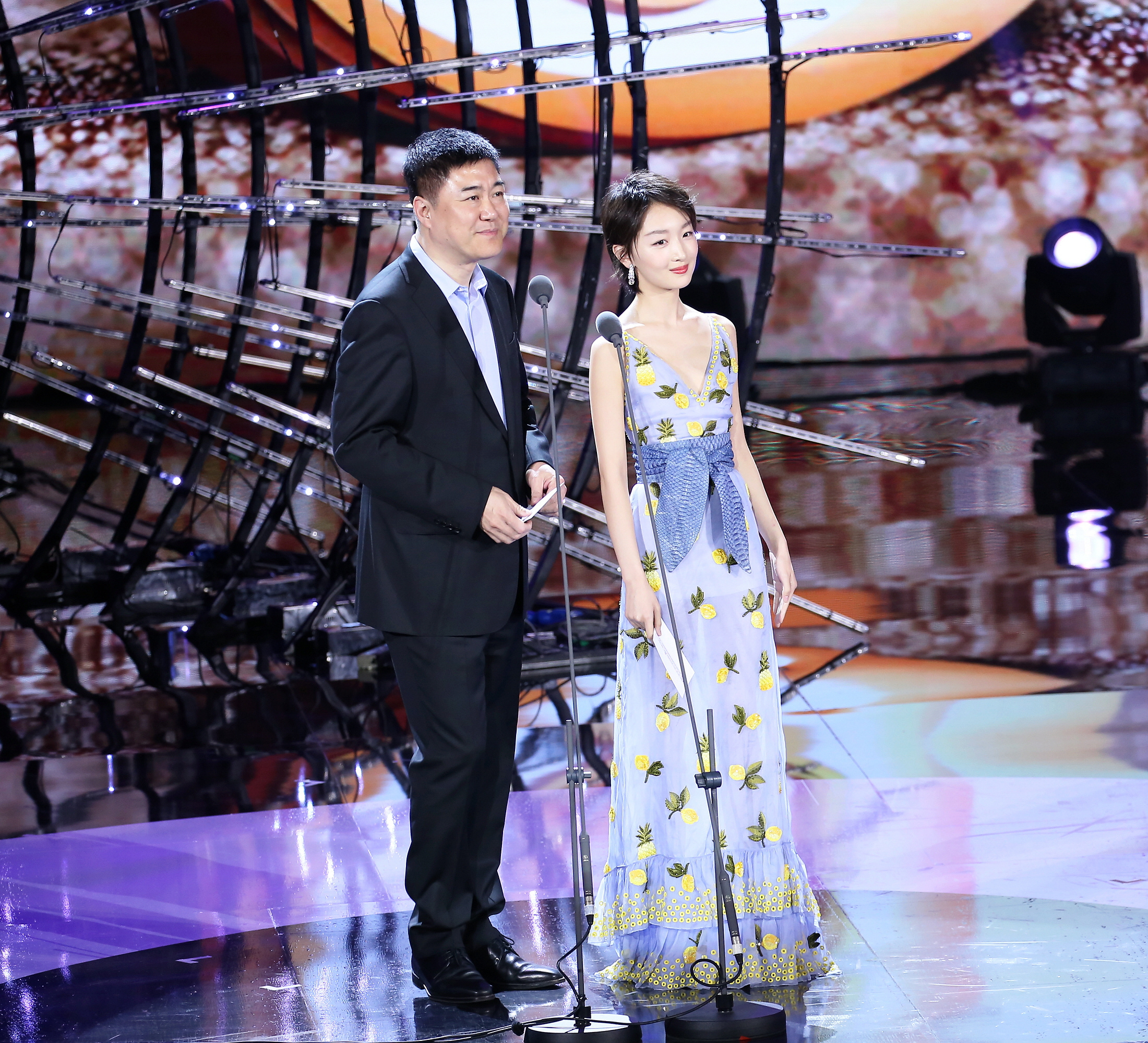 看完中餐厅好感up 很可爱的小女生 (周冬雨 微博电影之夜)